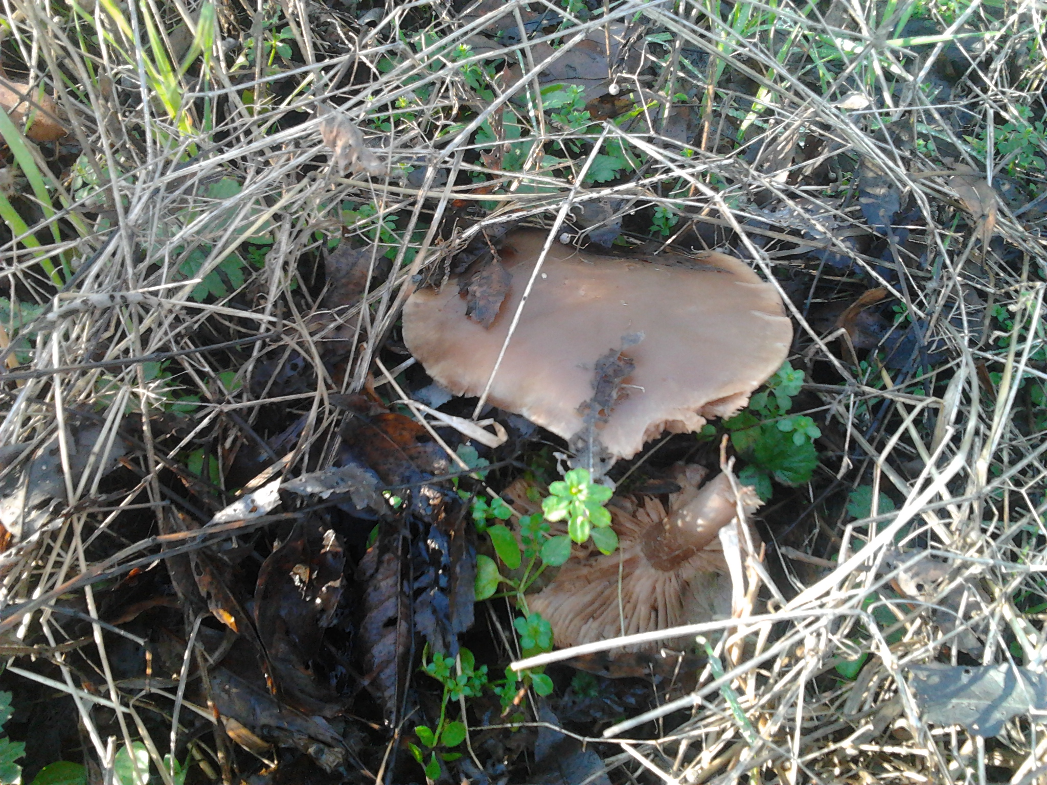 Késői laskagomba (Pleurotus ostreatus) az Eger-patak mentén.